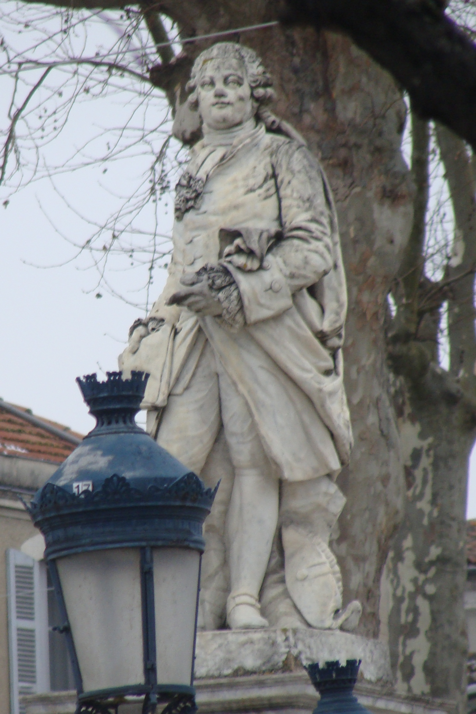 Détail de statue d'Antoine Mégret d'Etigny aux Allées d’Étigny, Auch (Gers). Inscriptions: À la gloire d'Antoine Mégret d'Étingy, intendant de justice, police et finances en Navarre, Béarn et Généralité d'Auch. Côte nord: "Je quitterai ce monde avec la dolce satisfaction d'avoir vu toutes mes peines et mes soins profiter à cette généralité. J'y ai fait faire des routes superbes, sources de tous les avantages que en ont résulté, j'y ai animé le commerce intérieur et extérieur en encouragé et protégé l'agriculture et les manufactures au point que je crois la laisser heureuse et même de jouir de plus en plus de fruits de mon application a y introduire et et animer l'industrie. Sur tous les objets possibles se me reste quelque regrette, c'est celui de ne pouvoir de rendre de plus longs services au plus aimé des rois, ni concourir au bien et l'avantage de cette généralité. Mes derniers vœux tendent à conservation de sa Majesté." "Extrait de la dernier lettre de M. d'Étigny à Contrôle Général." Côte sud: "Je vous proteste que le roi n'a jamais eu sujet plus fidèle que moi qui ait autant de zèle pour son service et autant d'envie de pendre heureux les sujets de la généralité dont il m'avoir confié l'administration. Vous savez que j'ai eu des ennemis. Je ne les ai pas mérités. Ils ne connoissoient pas le fond de mon cœur. J'oublie tout. Dieu ma fait la grâce de leur pardonner. Mes intentions et mes démarches ont été pures. Je n'ai jamais eu en vue que le service de mon maître et le bien public et quoique j'aie dérangé très considérablement ma fortune dans cette province pour des objets qui lui sont utiles. Je n'y ai aucun regret parce que j'ai rempli mon inclination et que je crois que ma mémoire y sera chérie." "Extrait de la dernier lettre de M. d'Étigny à Contrôle Général."